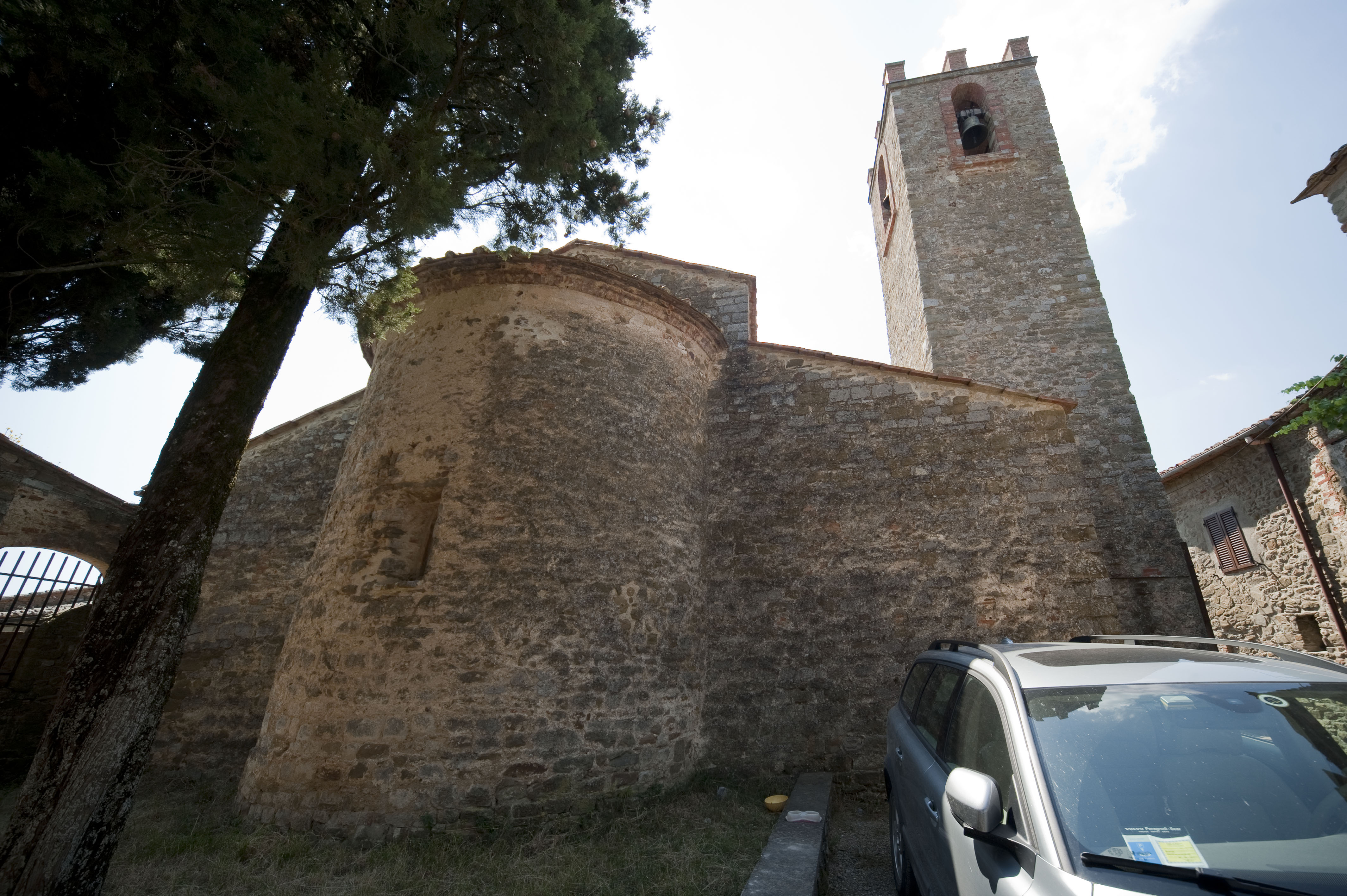 Abside della pieve di San Vincenti (Gaiole in Chianti)